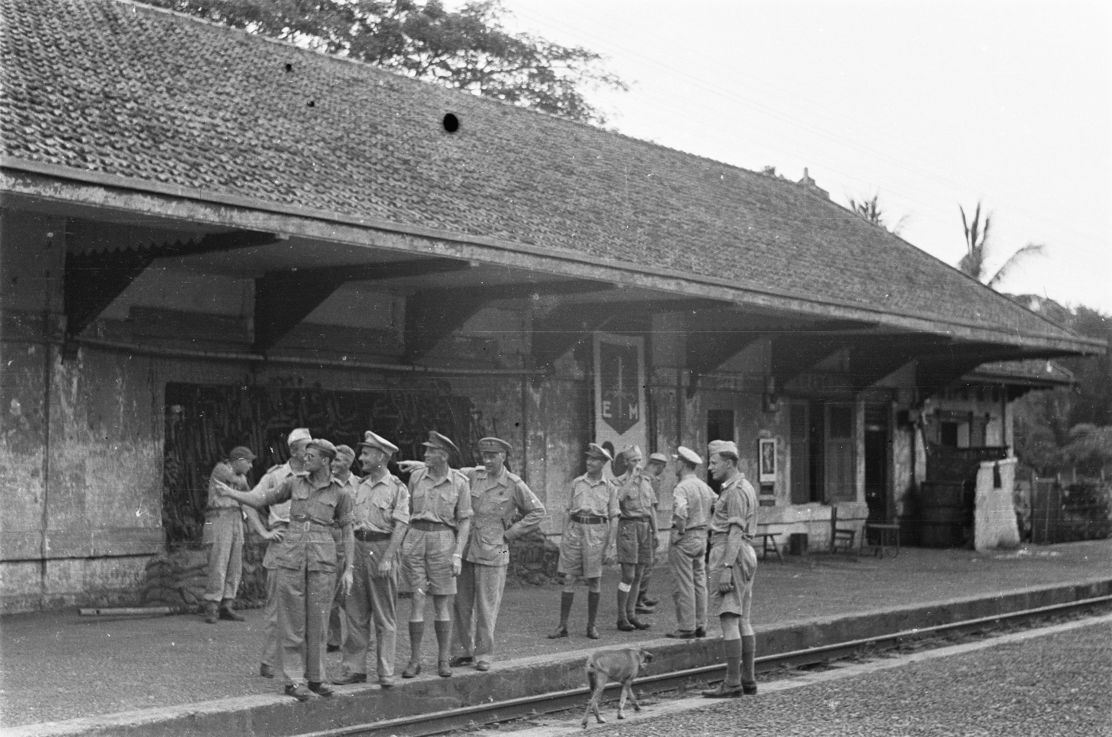 Collectie / Archief : Fotocollectie Dienst voor Legercontacten Indonesië Reportage / Serie : Inspectietocht generaal H.J. Kruls door Indonesië Beschrijving : [2e Infanterie Brigadegroep] [Op het station Krandji] Datum : 2 mei 1947 Locatie : Indonesië, Nederlands-Indië Fotograaf : Fotograaf Onbekend / DLC Auteursrechthebbende : Nationaal Archief Materiaalsoort : Negatief (zwart/wit) Nummer archiefinventaris : bekijk toegang 2.24.04.02 Bestanddeelnummer : 4304